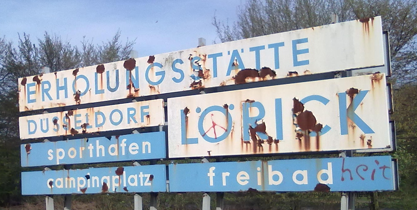 Hinweisschild auf die Freizeitstätte/das Freibad Lörick in Düsseldorf-Lörick